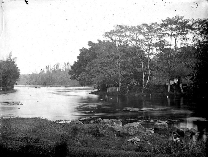 Negatief. Rivieroever, Wendit, Oost-Java